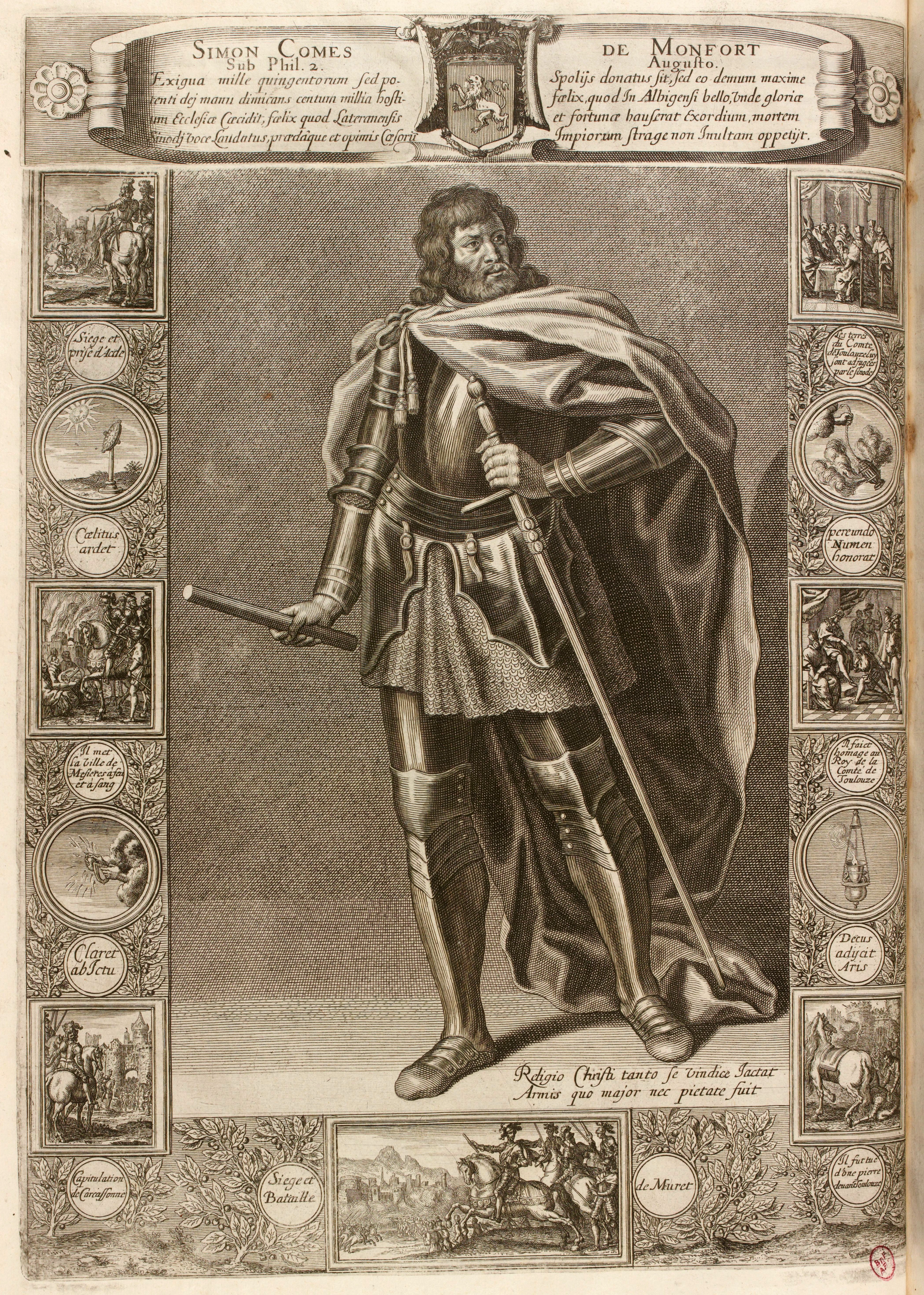 Simon Comes de Montfort, gravure publiée dans Les hommes illustres et grands capitaines françois qui sont peints dans la galerie du Palais Royal. Ensemble un abrégé de leurs vies & actions memorables de Marc de Vulson de La Colombière. 1690. Dessin et graveur : Zacharie Heinse et François Bignon